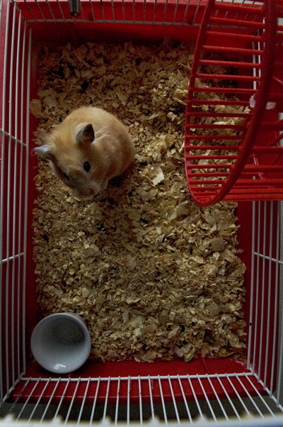 Hamster en cage (Femelle)